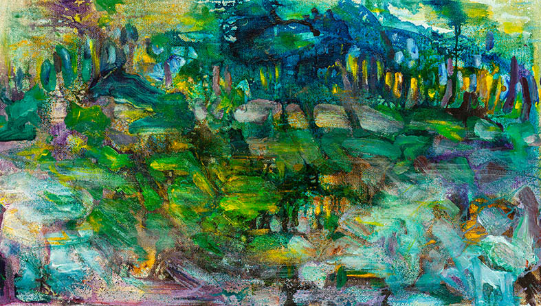 Walter Baldessarini Capri 60x104cm 2007